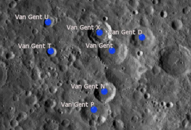 Cráter lunar Van Gent. Cráteres satélite. (Imagen LRO)